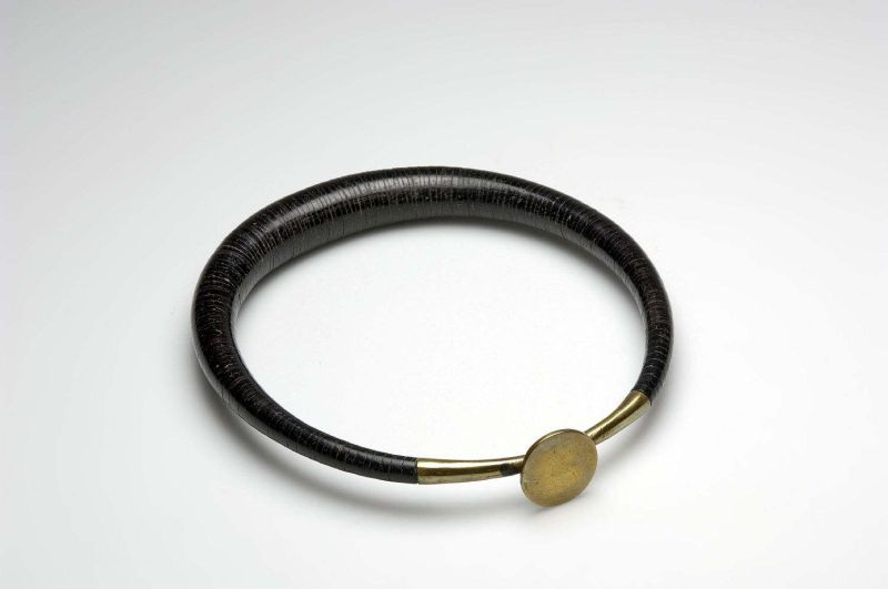 Halssieraad. Halsring, voor mannen die aangetoond hebben zeer dapper te zijn Unknown language: Kalabubu